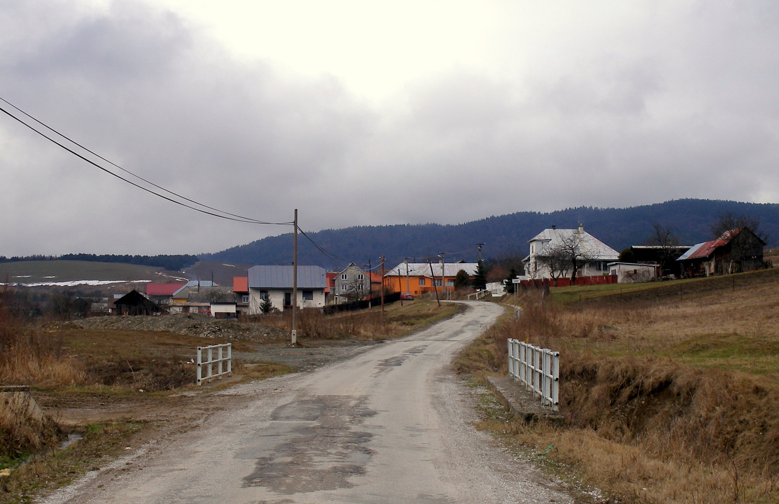 Obec Oľšov okres Sabinov región Šariš